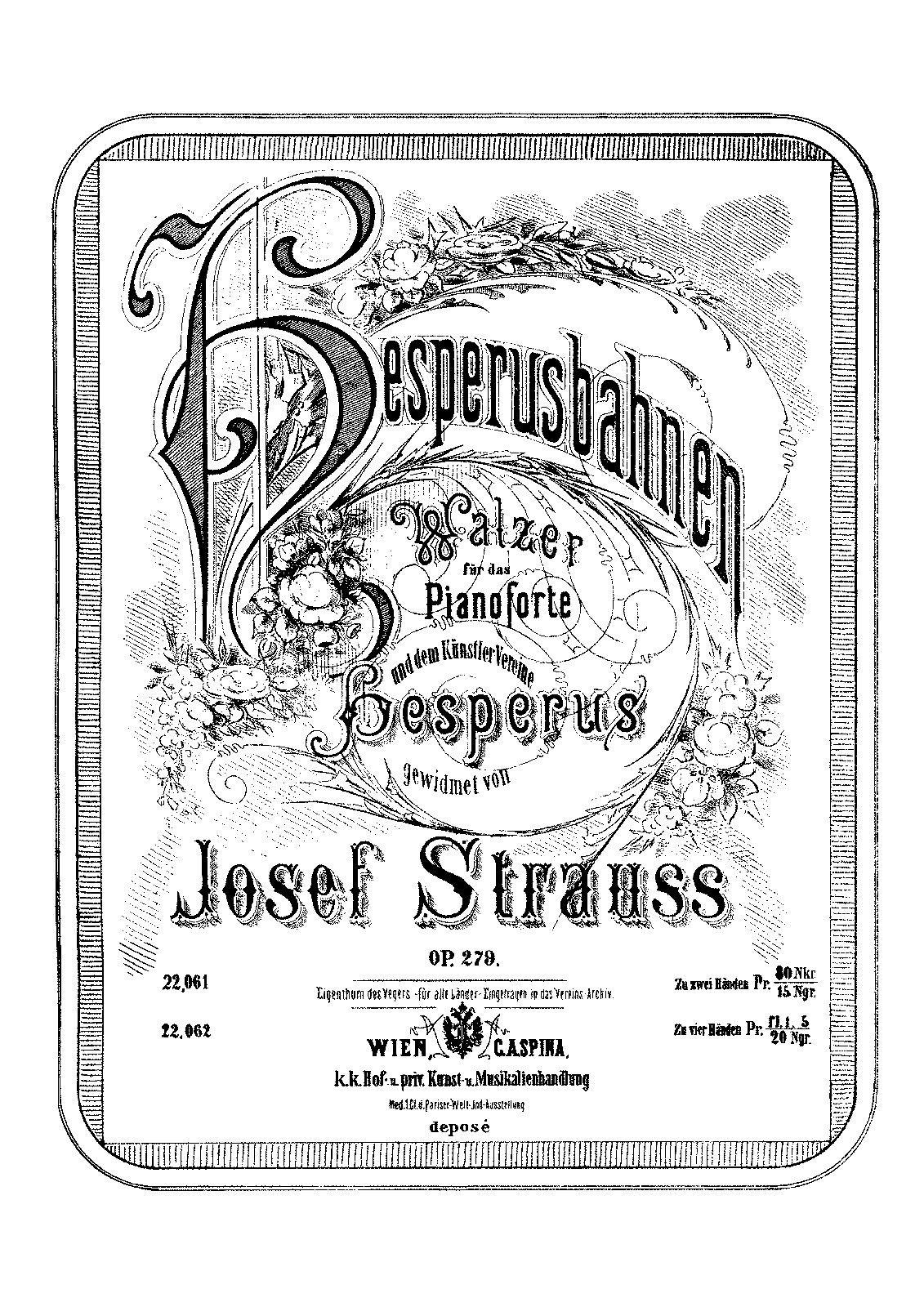 ヨーゼフ・シュトラウス作曲のワルツ『宵の明星の軌道』のピアノ譜表紙。